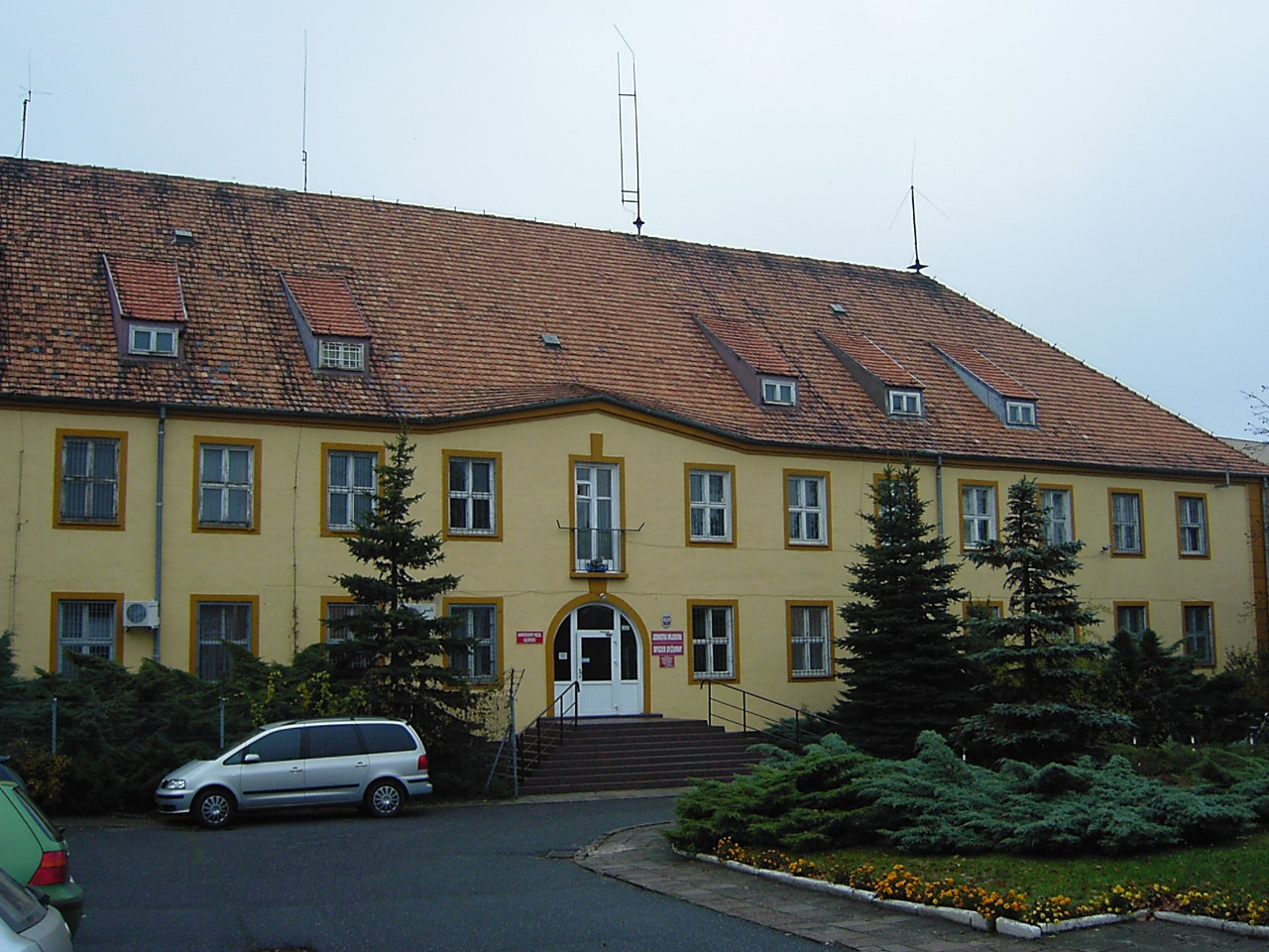 Sztab 4 Dywizji w Krośnie Odrzańskim. Zdjęcie późniejsze